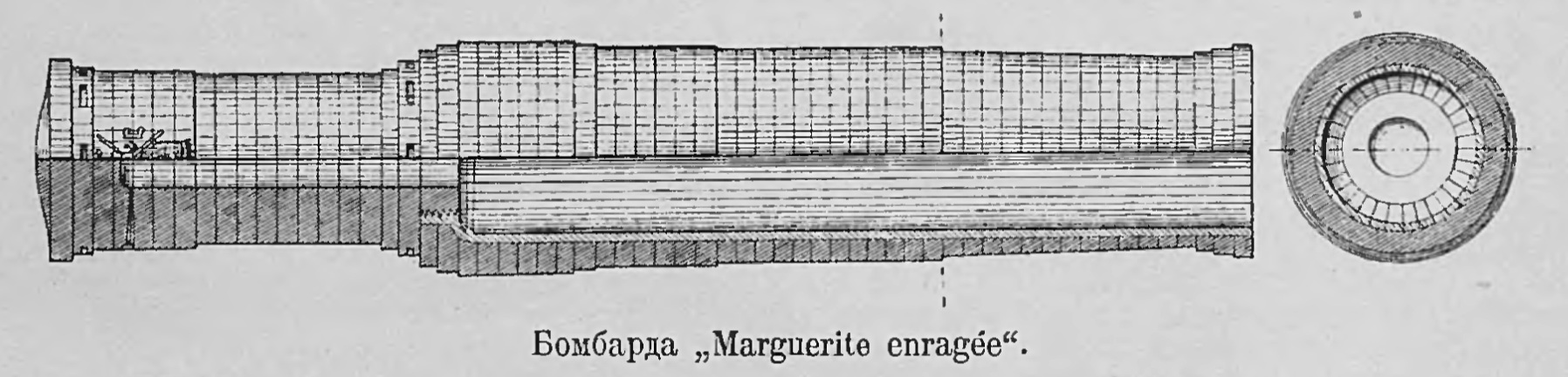 Чертеж с разрезом бомбарды Marguerite Enragee